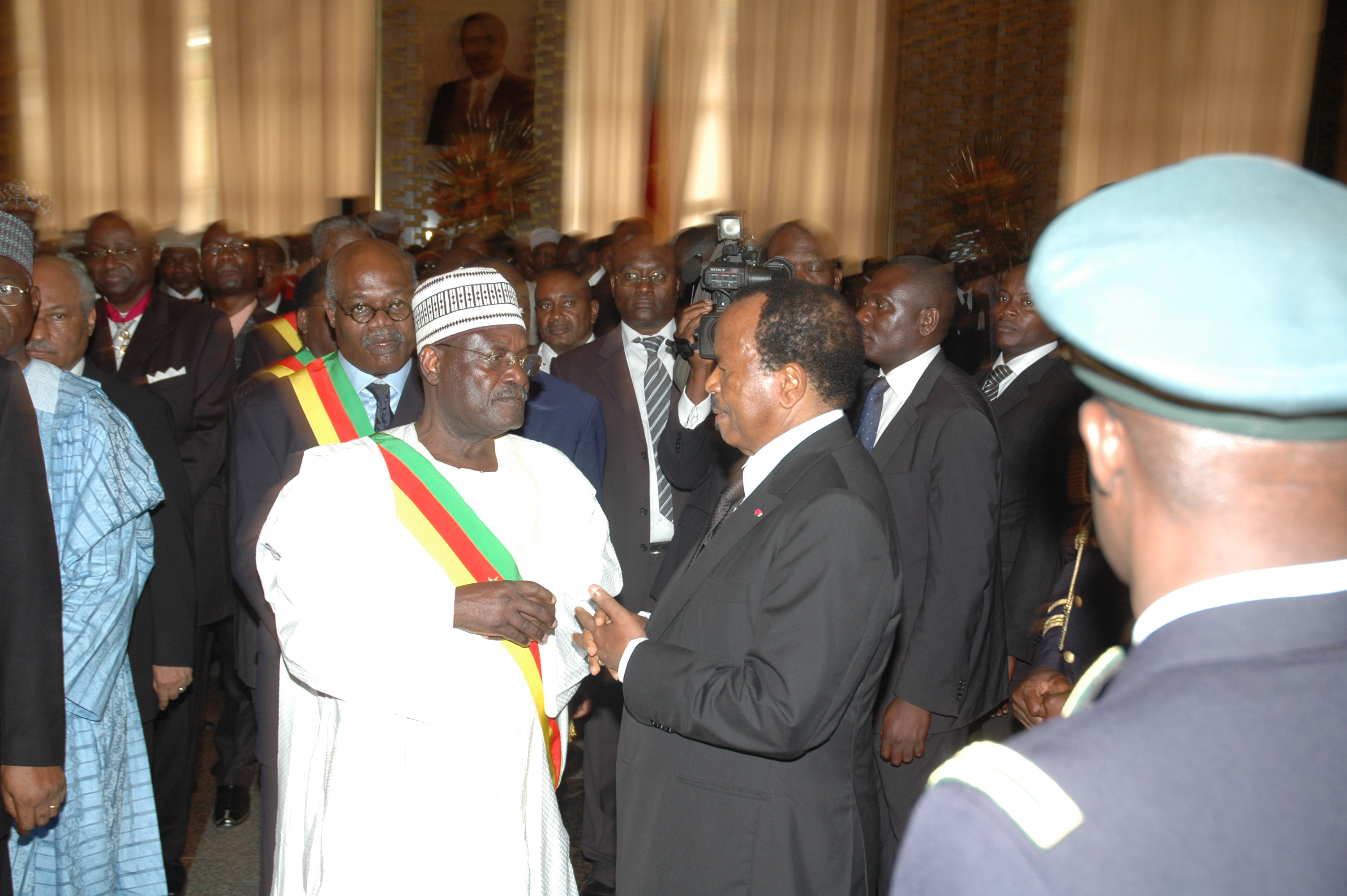 Le président de l'Assemblée Nationale du Cameroun au palais de l'unité lors de la cérémonie de présentation des voeux au président Paul Biya